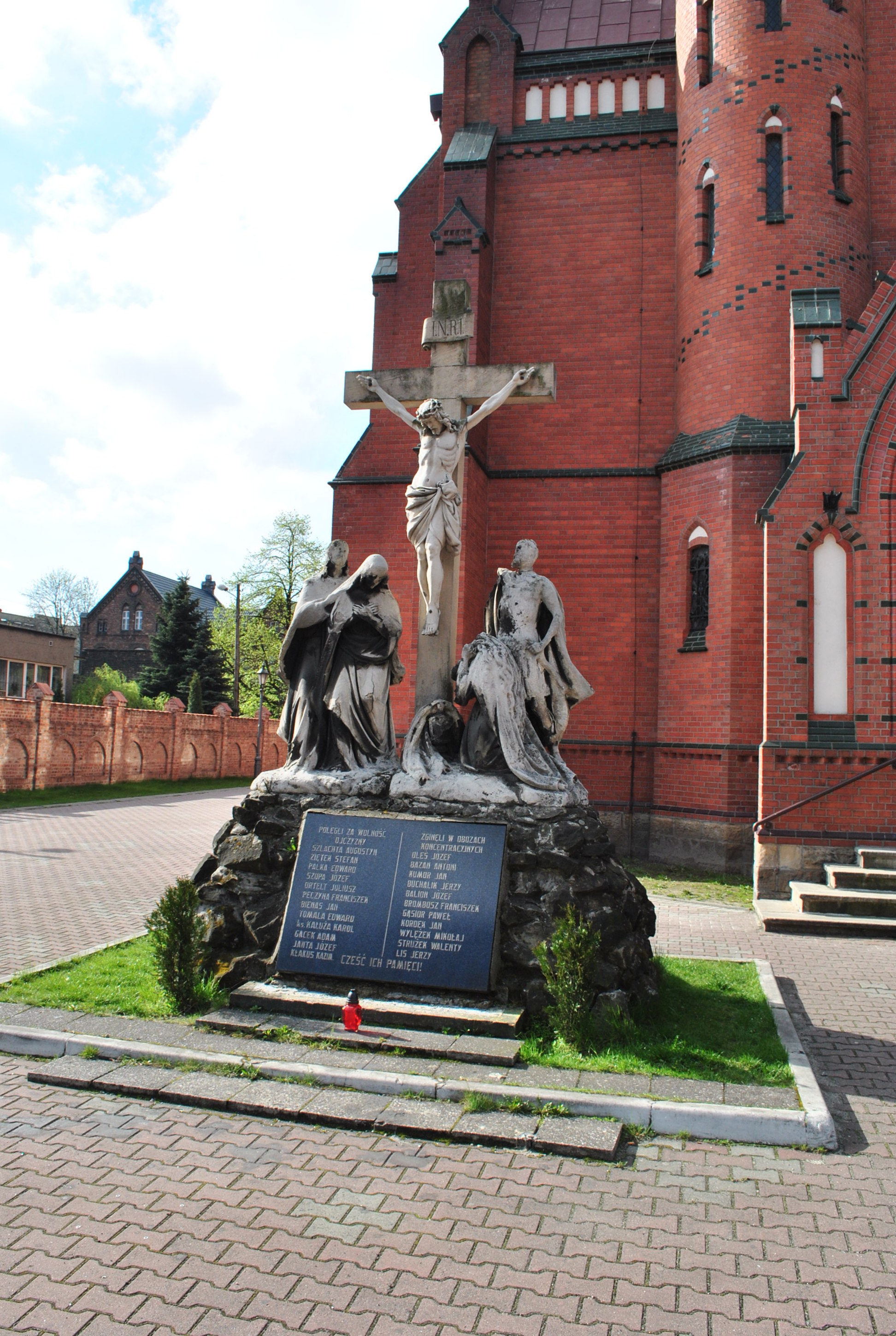 Katowice - Załęże. Pomnik (krzyż z tablicą), upamiętniający poległych o wolność ojczyzny w okresie powstań śląskich i zgładzonych w hitlerowskich obozach koncentracyjnych